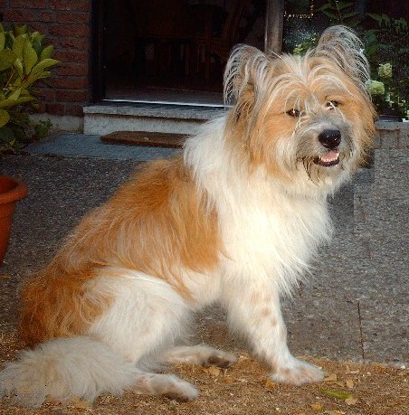 Hund, Rasse: Elo, Rauhaar, Rüde, braun-weiß